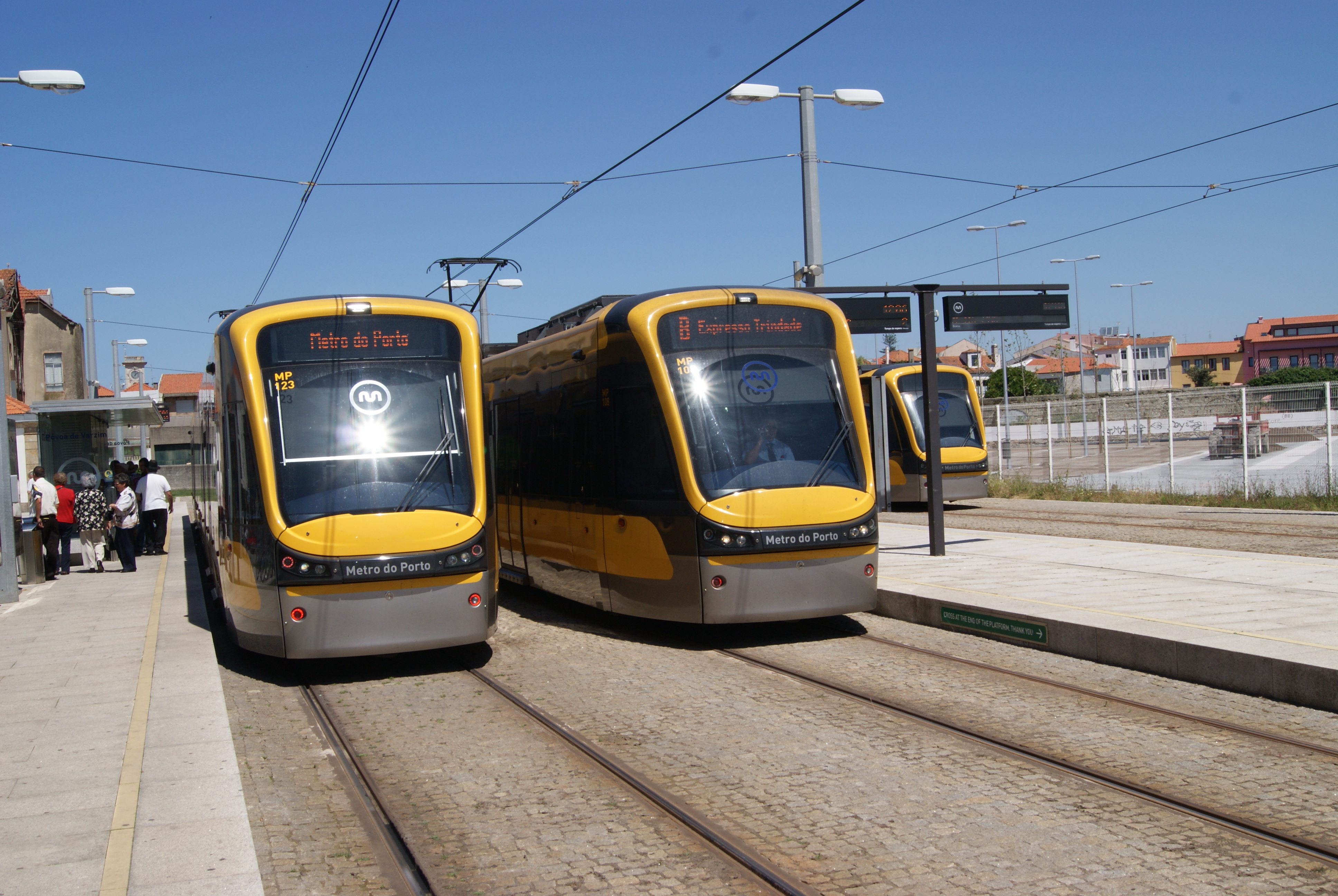 Photo. Trams aux Fils. Gare de Povoa de Varzim Pour moi, ce n'est pas un métro, pas un tram et pas un train, mais les trois à la fois.